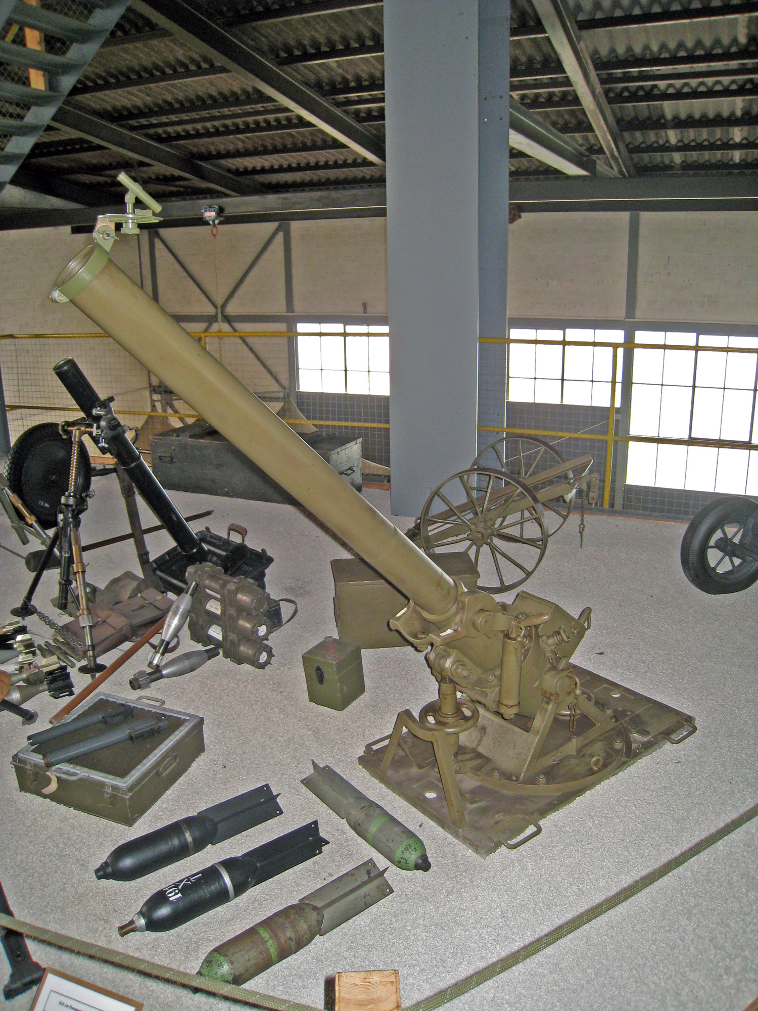 10,5 cm Pressgasminenwerfer 1917 im Museum Full